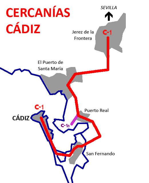 Plano de Cercanías Cádiz